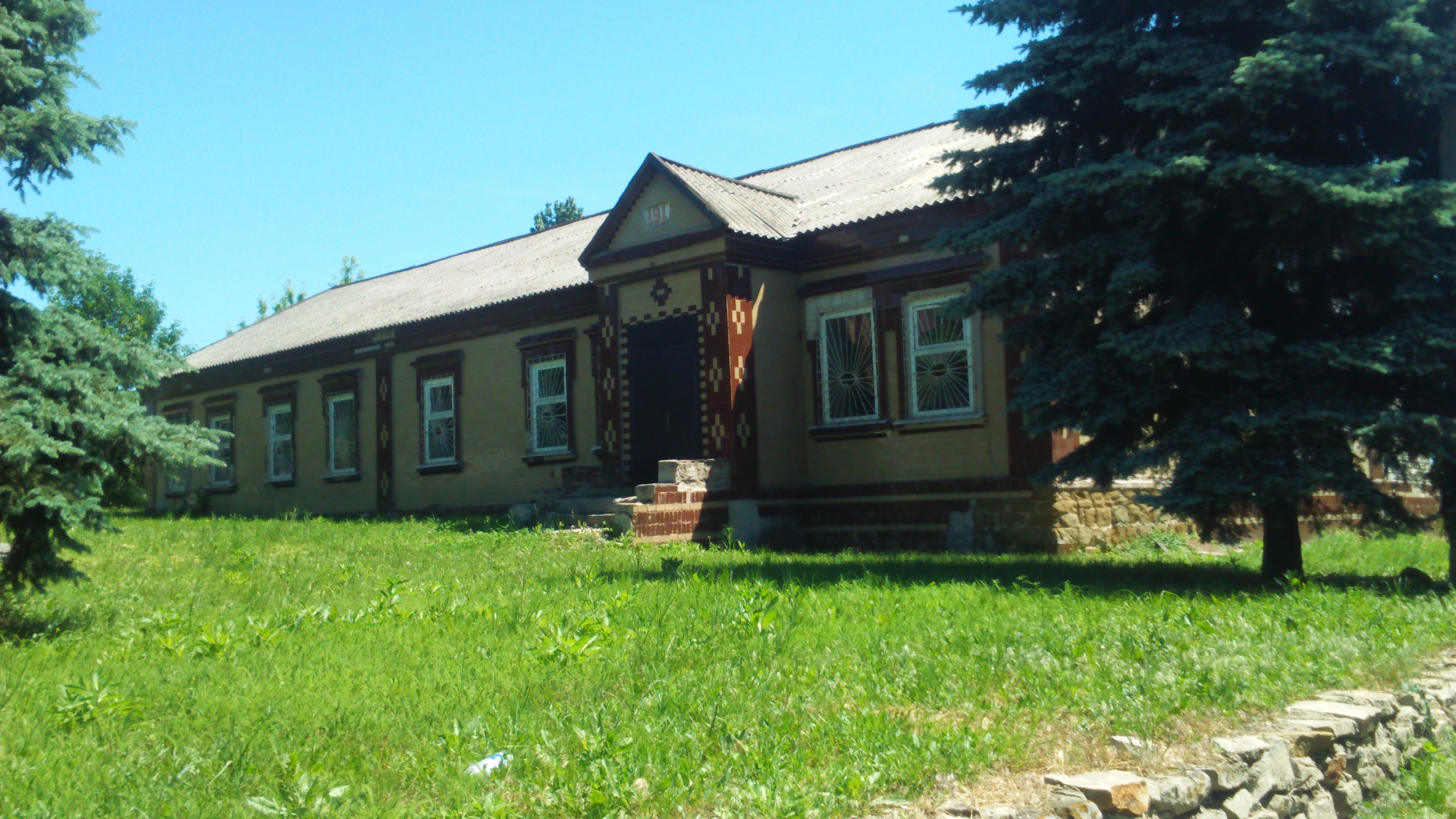 Добропі́лля — село в Україні, Добропільському районі Донецької області, над річкою Водяна.